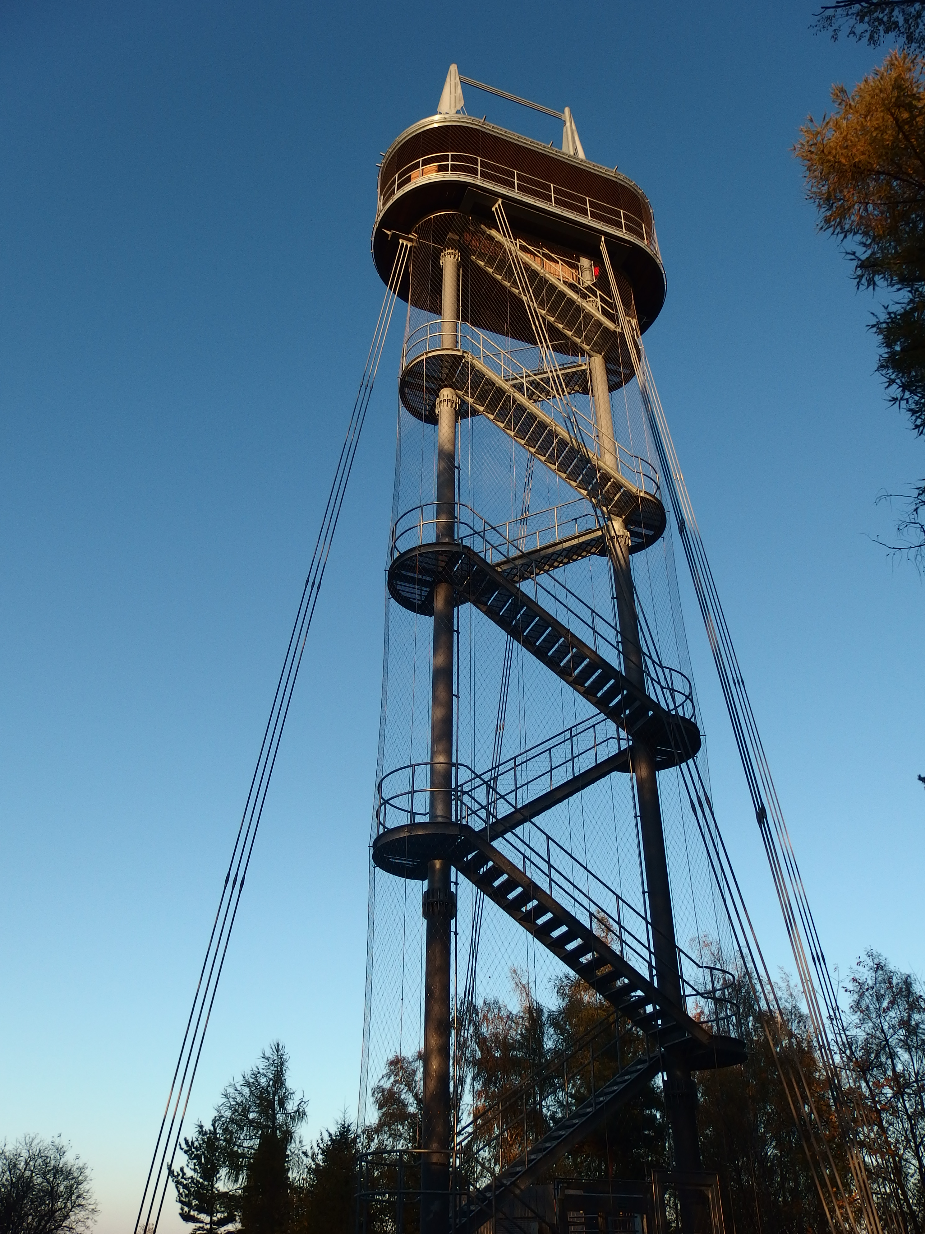 Rozhledna „Hýlačka“ - nová ocelová konstrukce zpřístupněná v roce 2015.